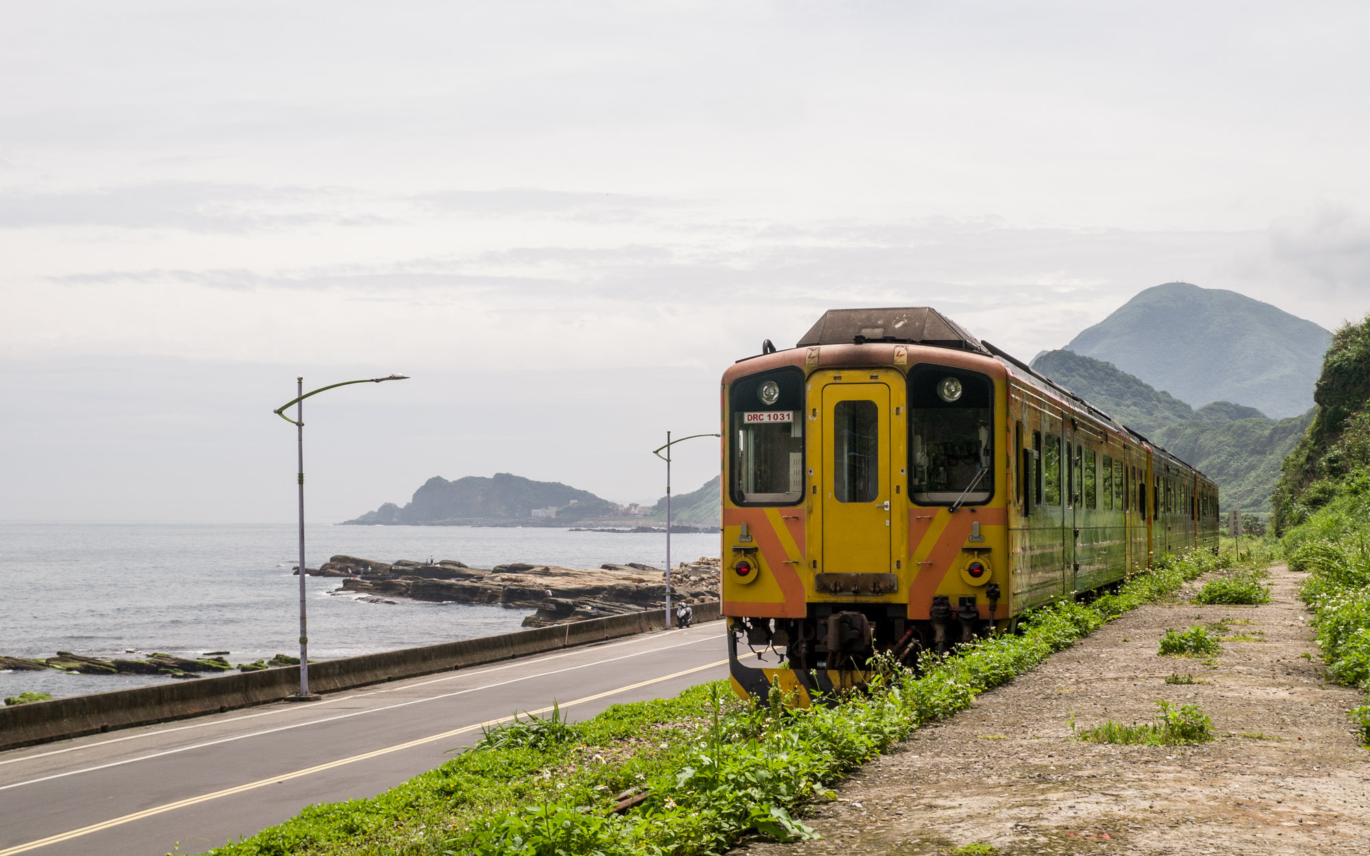 第 4808 車次區間車（DR1000）順行深澳線